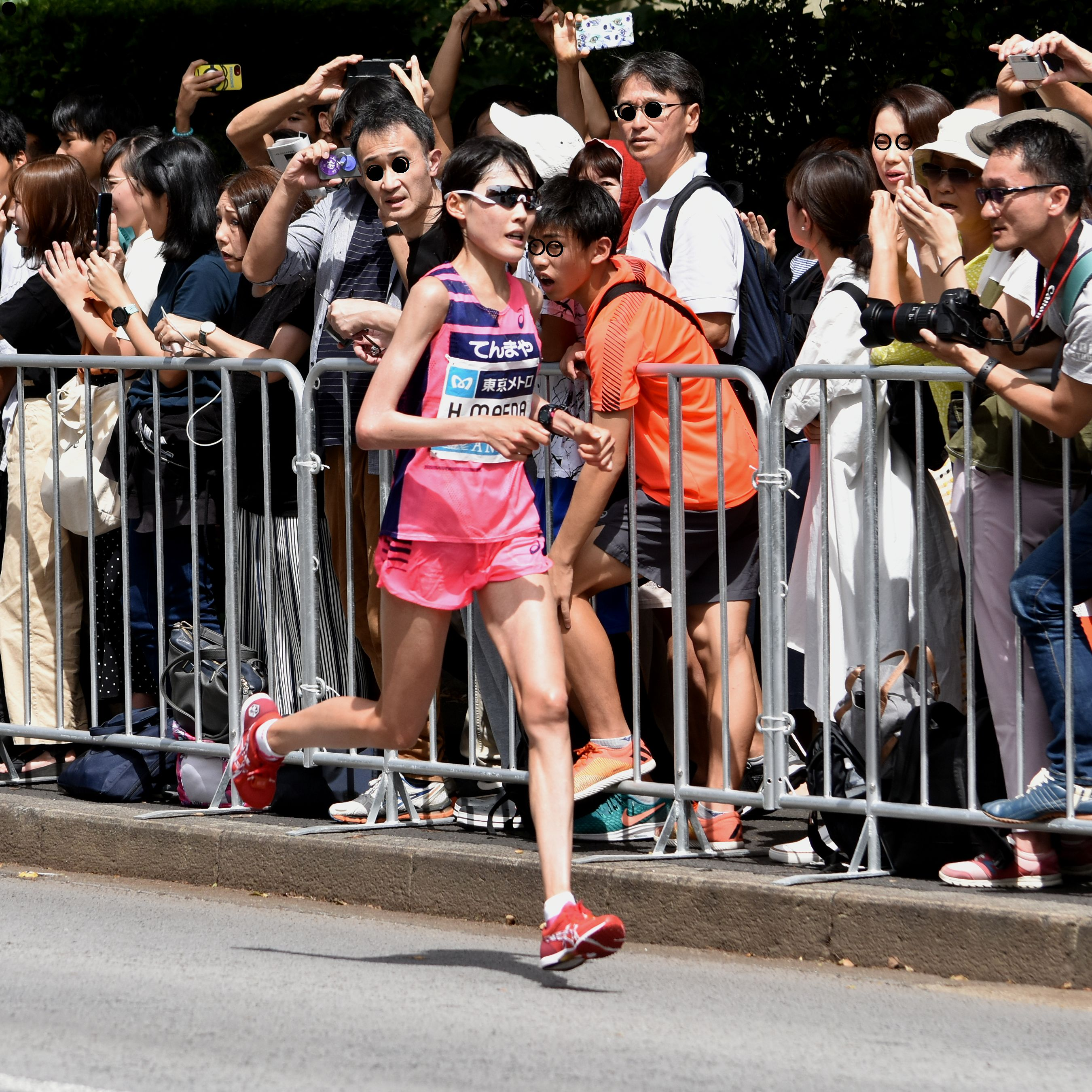 前田 穂南